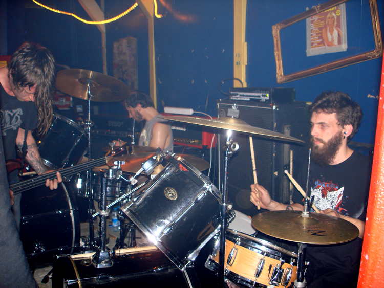 Kylesa playing live at Bar en Boos (2006).